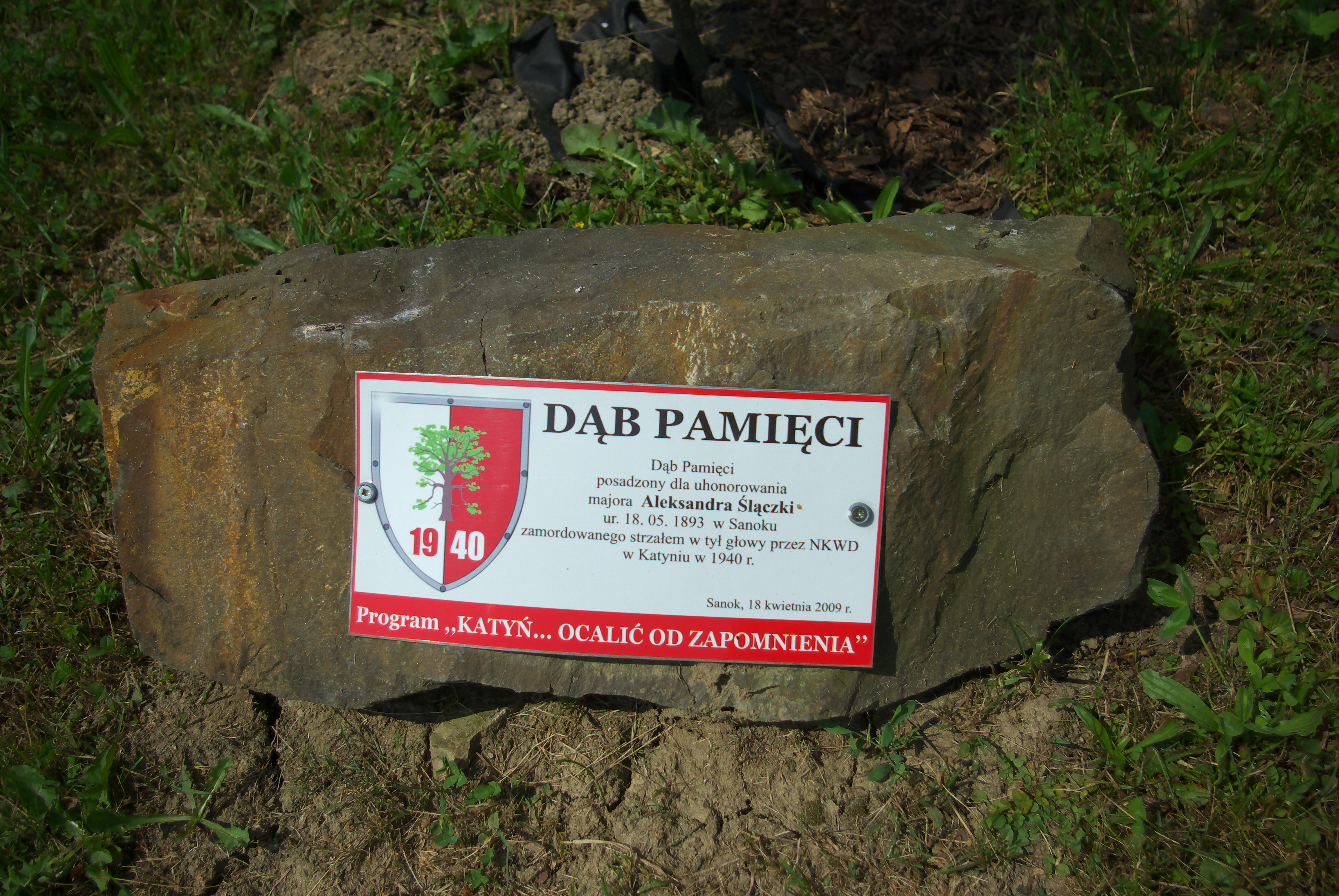 Dąb Pamięci Aleksandra Ślączki w ramach Pomnika Golgota Wschodu na Cmentarzu Centralnym w Sanoku.